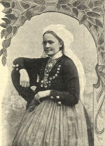 Cilluf Olsson (1847-1916), svensk konstvävare